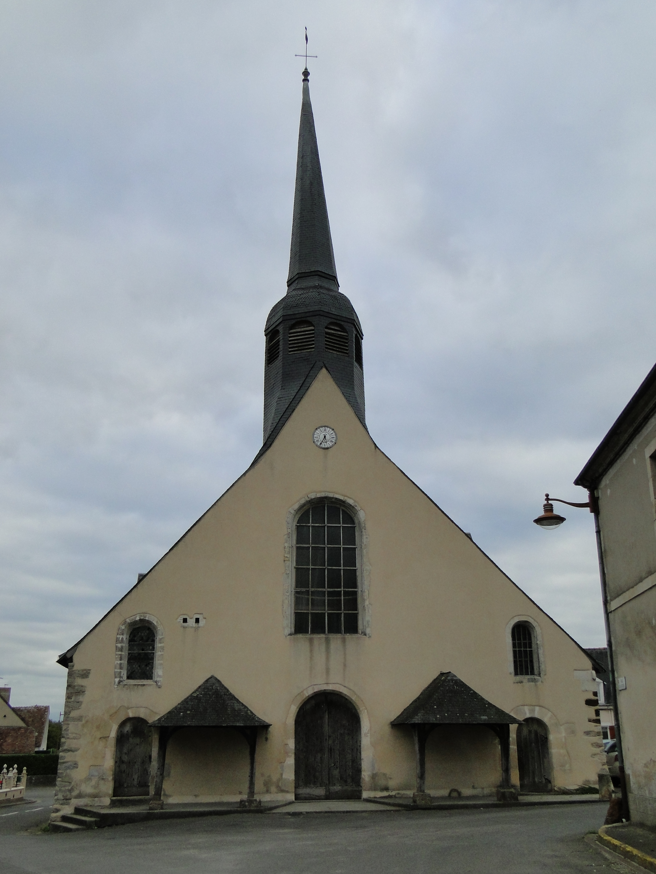 Eglise Notre-Dame de Cérans (Sarthe)